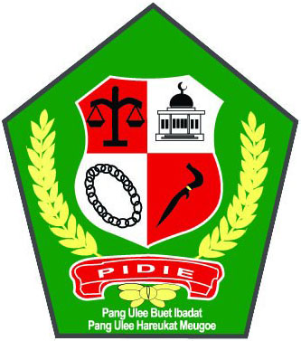 Logo Kabupaten Pidie